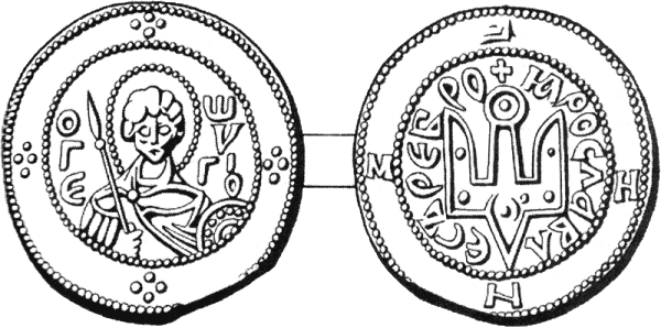 Киевская Русь. Начало XI в. Сребреник Ярослава Владимировича Мудрого. 1019-54 гг. Лицевая (Св. Георгий) и оборотная (трезубец) стороны.